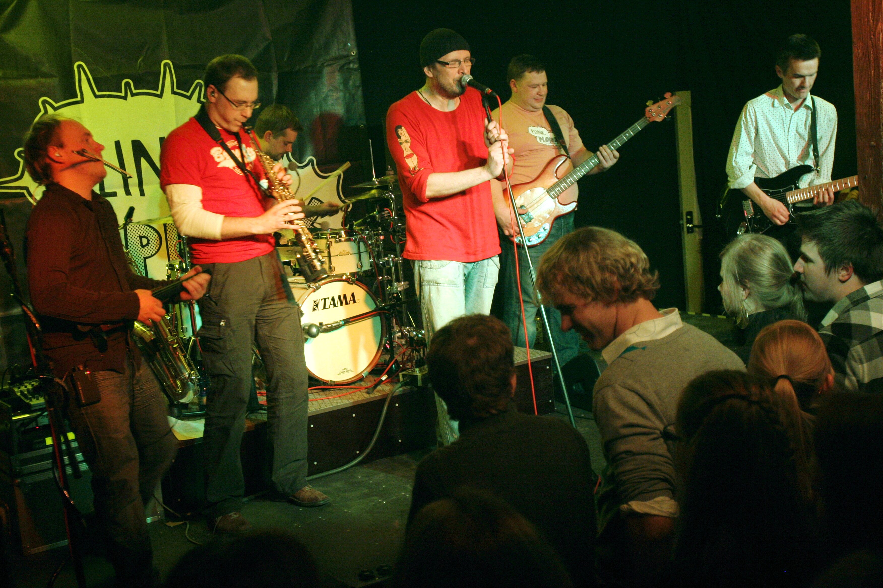 Ansambel Jääboiler esinemas 24. aprillil 2009 Tartus, klubi Plink Plonk avamisel. Pildil vasakult viiuldaja Tiit Kikas, saksofonist Meelis Unt, trummar Tiit Kevad, solist InBoil, bassimängija Alari Piispea ja kitarrist Marek Talts.